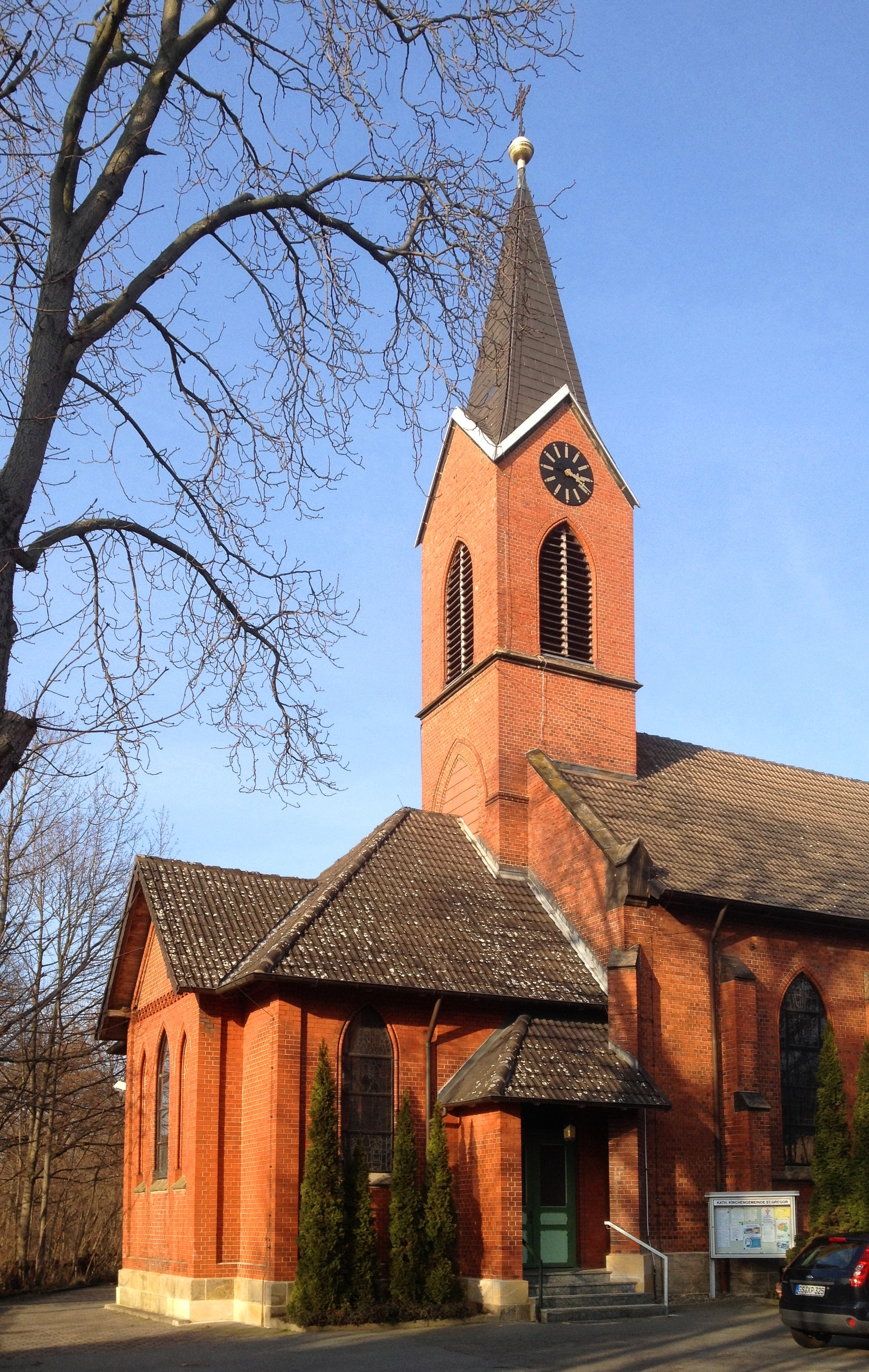 Bad Harzburg-Bündheim, kath. Kirche St. Gregor VII.